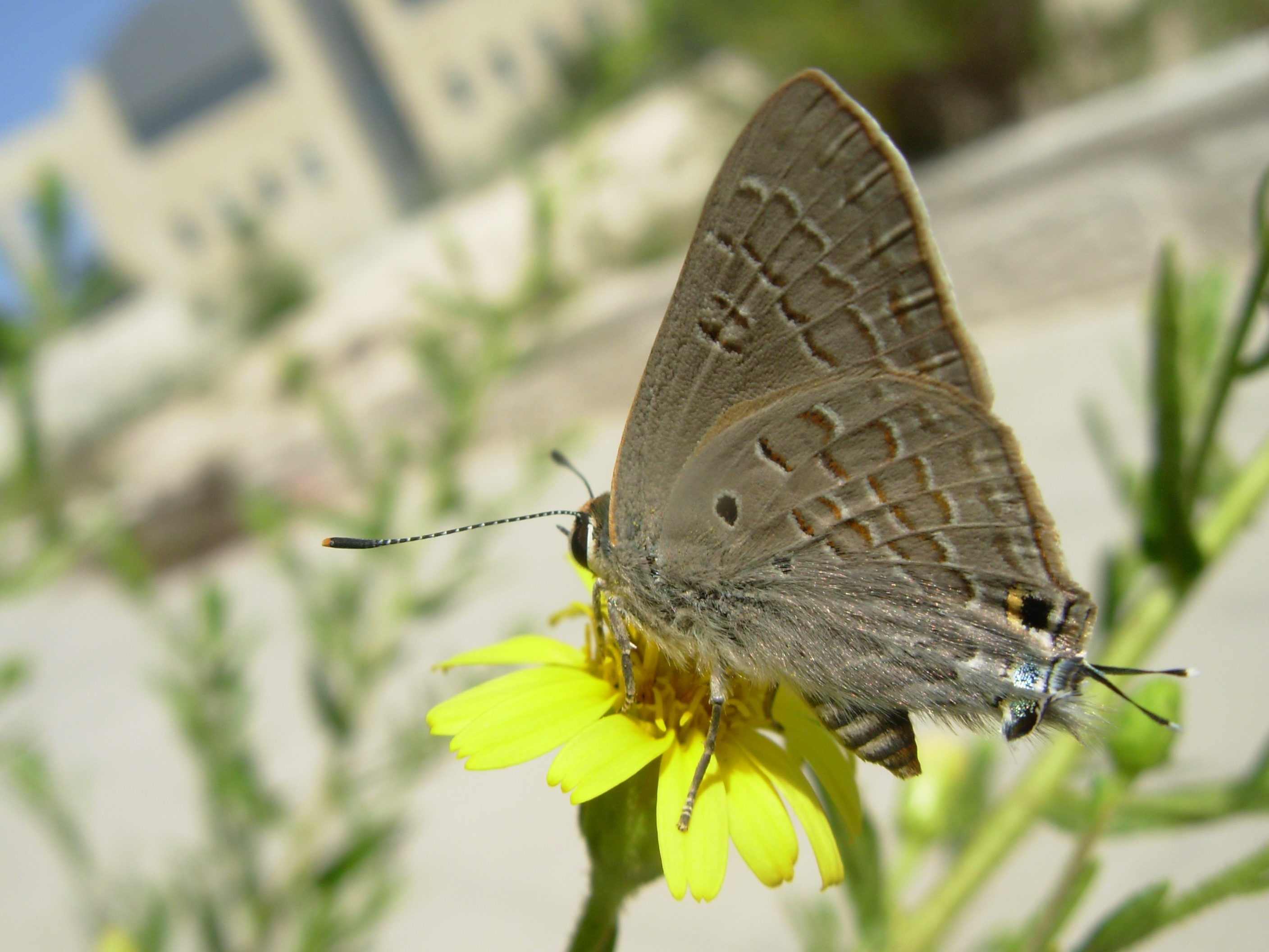 כחליל הרימון צולם בגבעה הצרפתית בספטמבר 2011